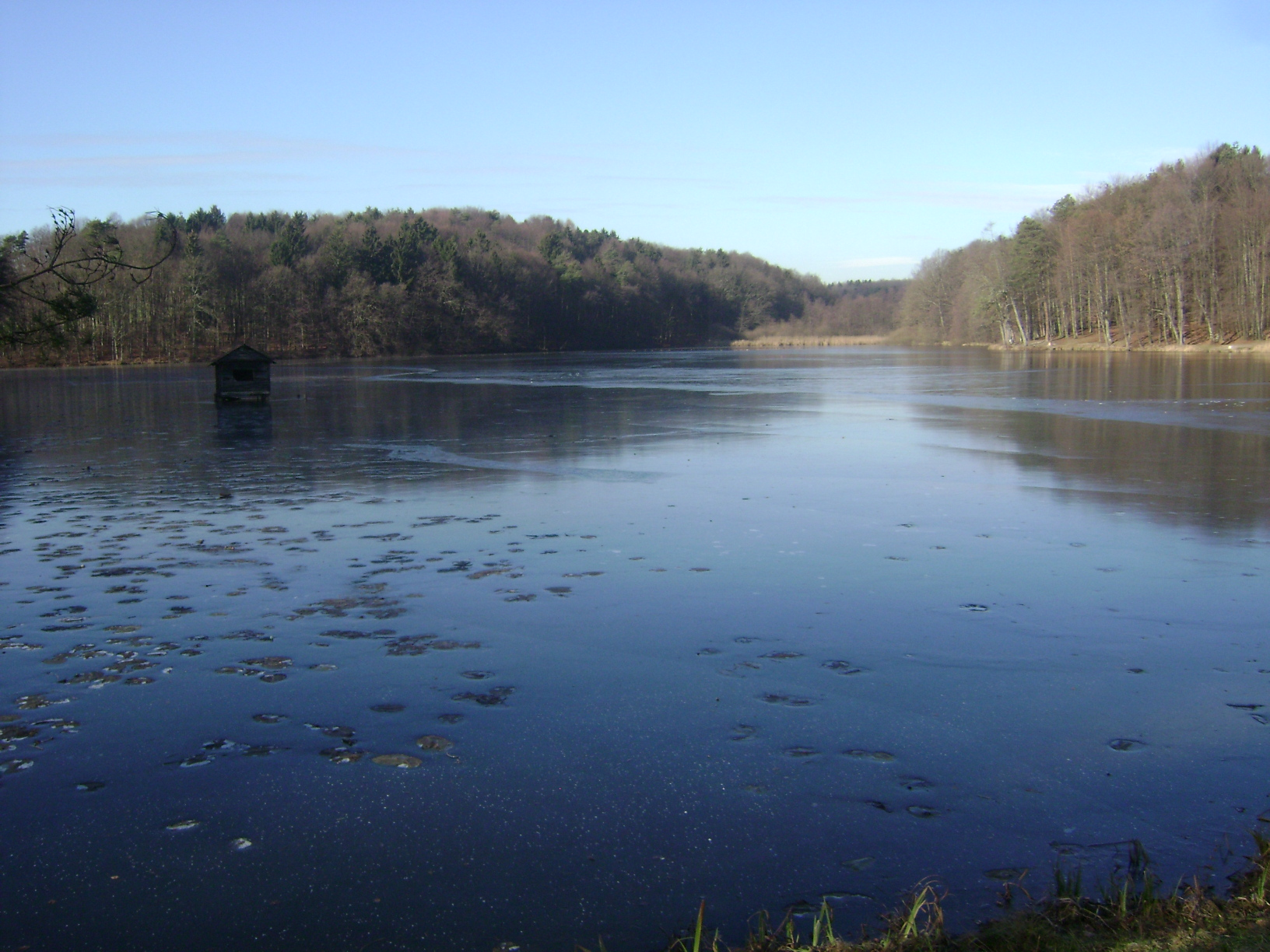 Negovsko jezero